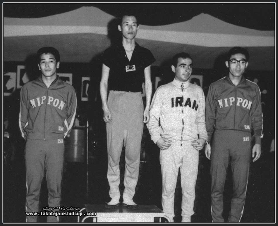 Nobuhiko Hasegawa, Kim Chung-yong, Houshang Bozorgzadeh, Koji Kimura, 1966 Asian Games